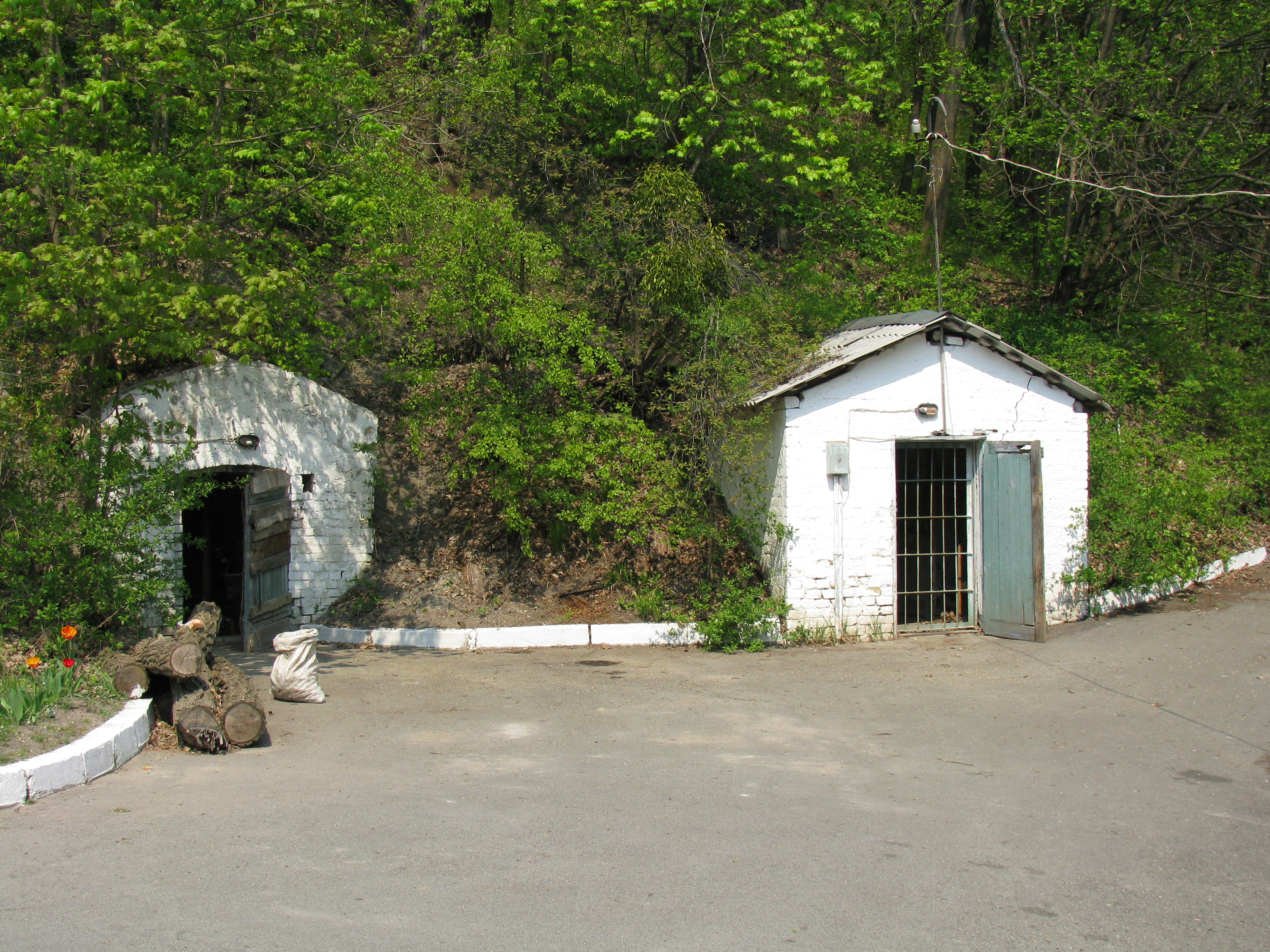 Holosiiv Raion, Kiev